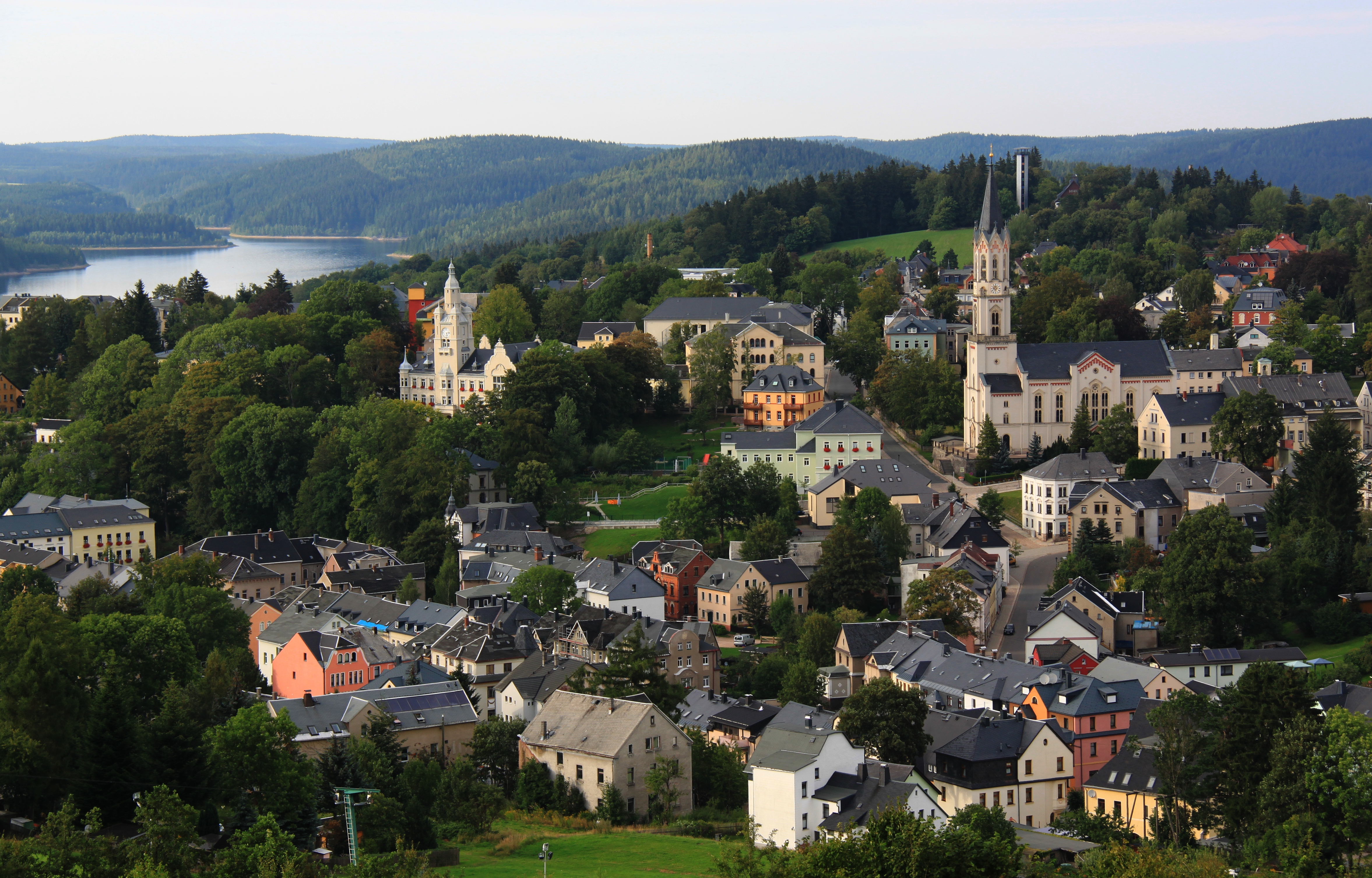 Blick auf Eibenstock